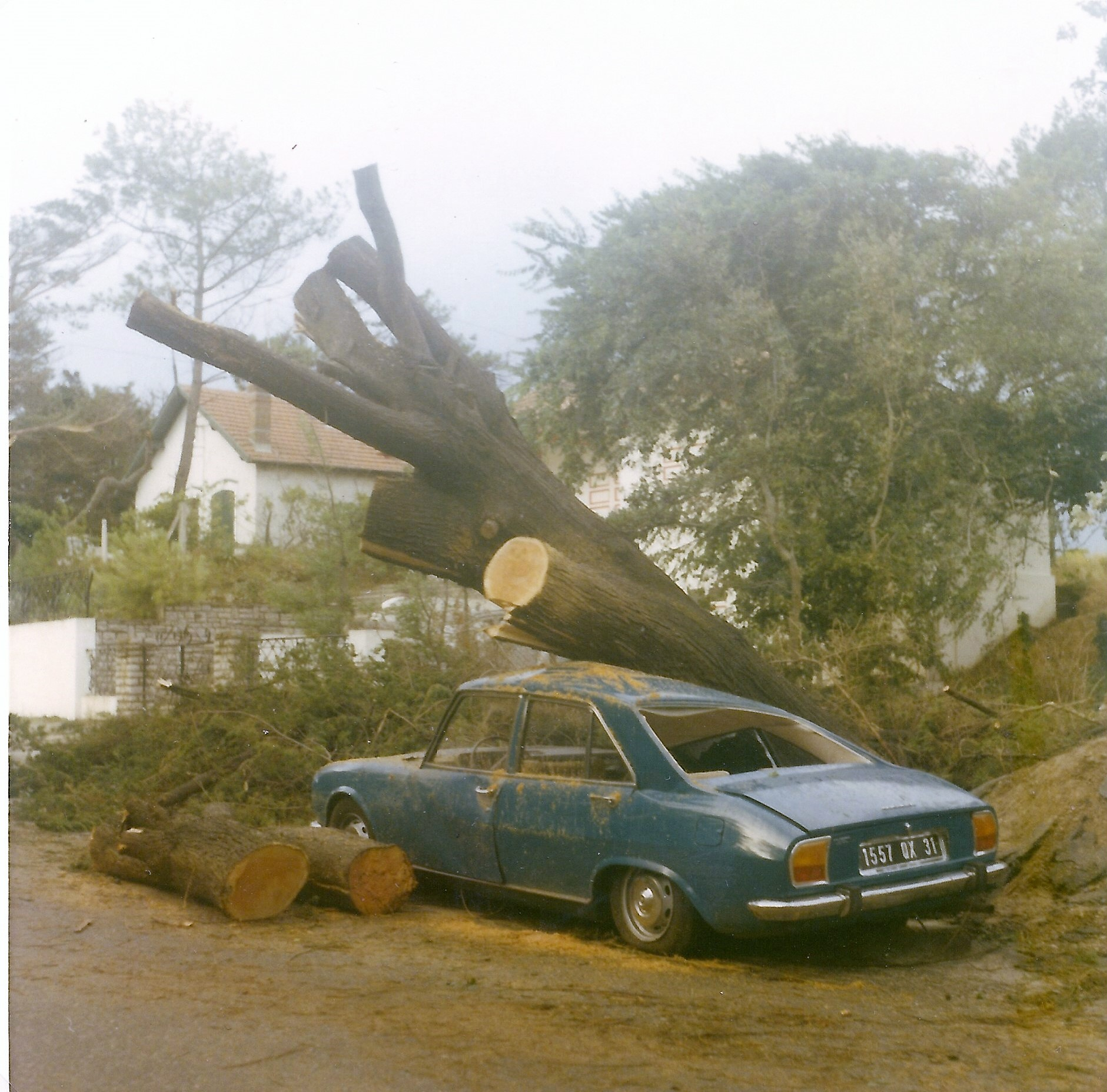 Grand cyprès de la route entre la plage et la ville abattu sur une voiture. Capbreton (Landes). La plupart des cyprès de cette route ont été abattus ce jour-là.